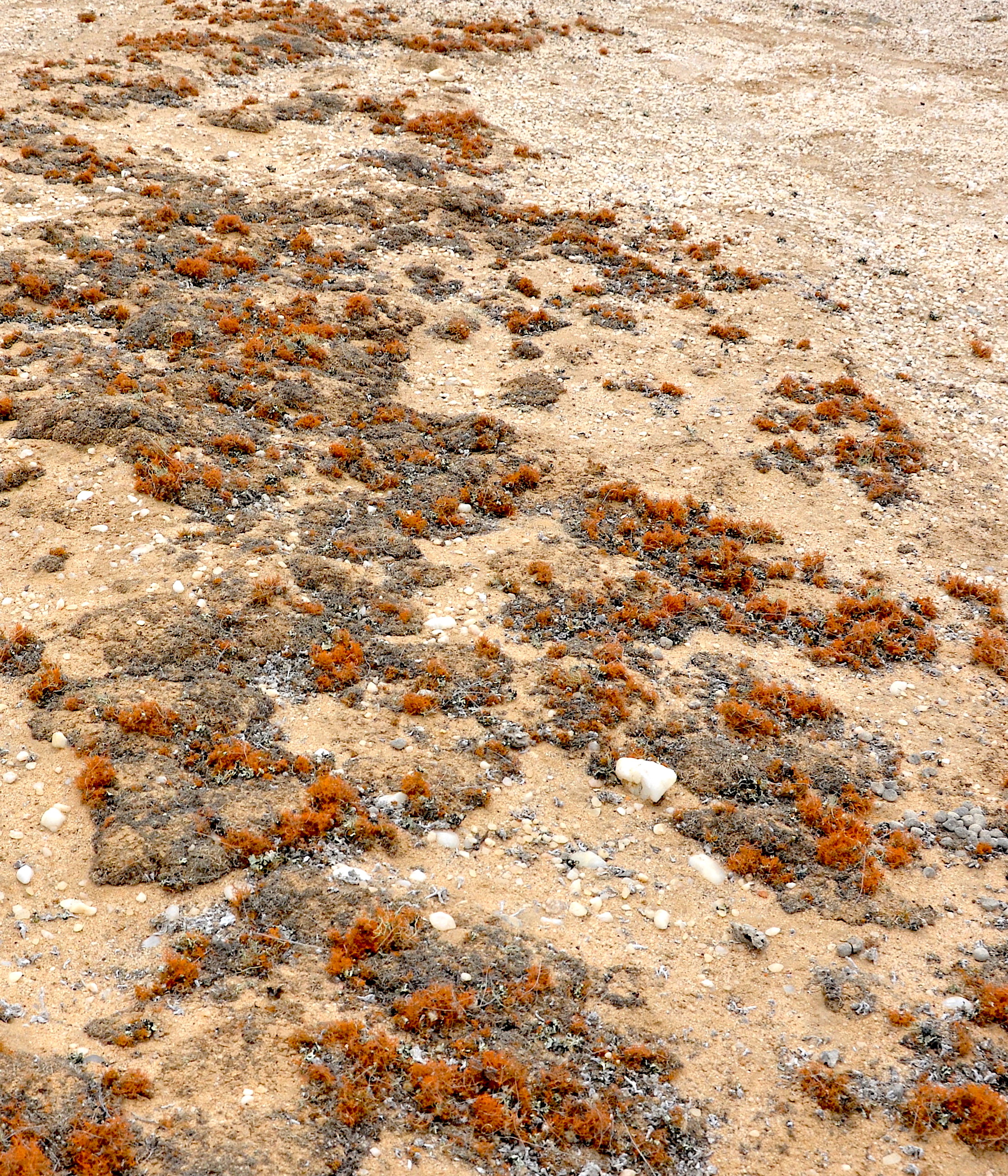 Flechten (Lichen) bei Wlotzkasbaken in Namibia